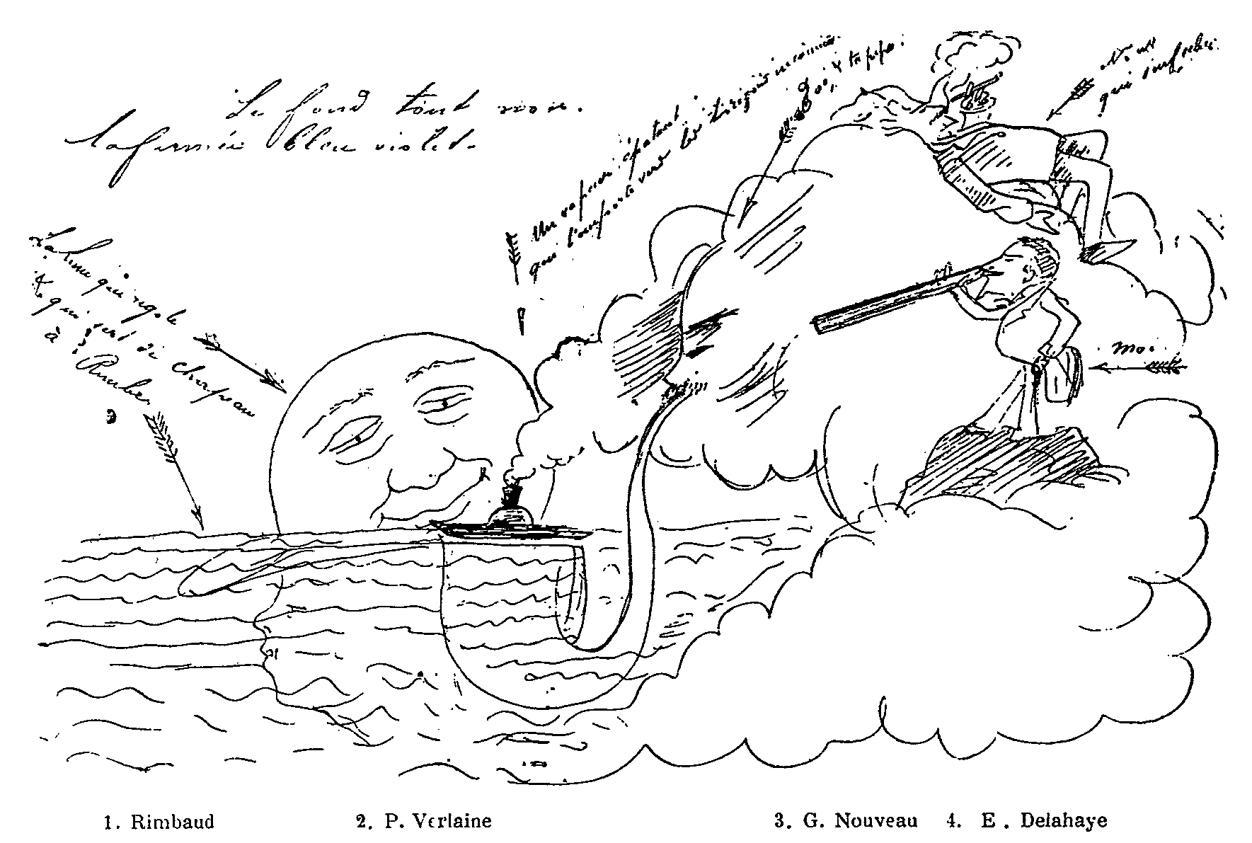 Arthur Rimbaud, Paul Verlaine, Germain Nouveau et Ernest Delahaye. Croquis d'Ernest Delahaye (1853-1930) d'après un dessin de Germain Nouveau (1851-1920).